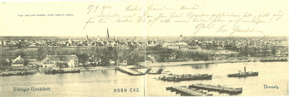 Панорама Новог Сада, почетак 20. века Поглед са Петроварадина на Нови Сад